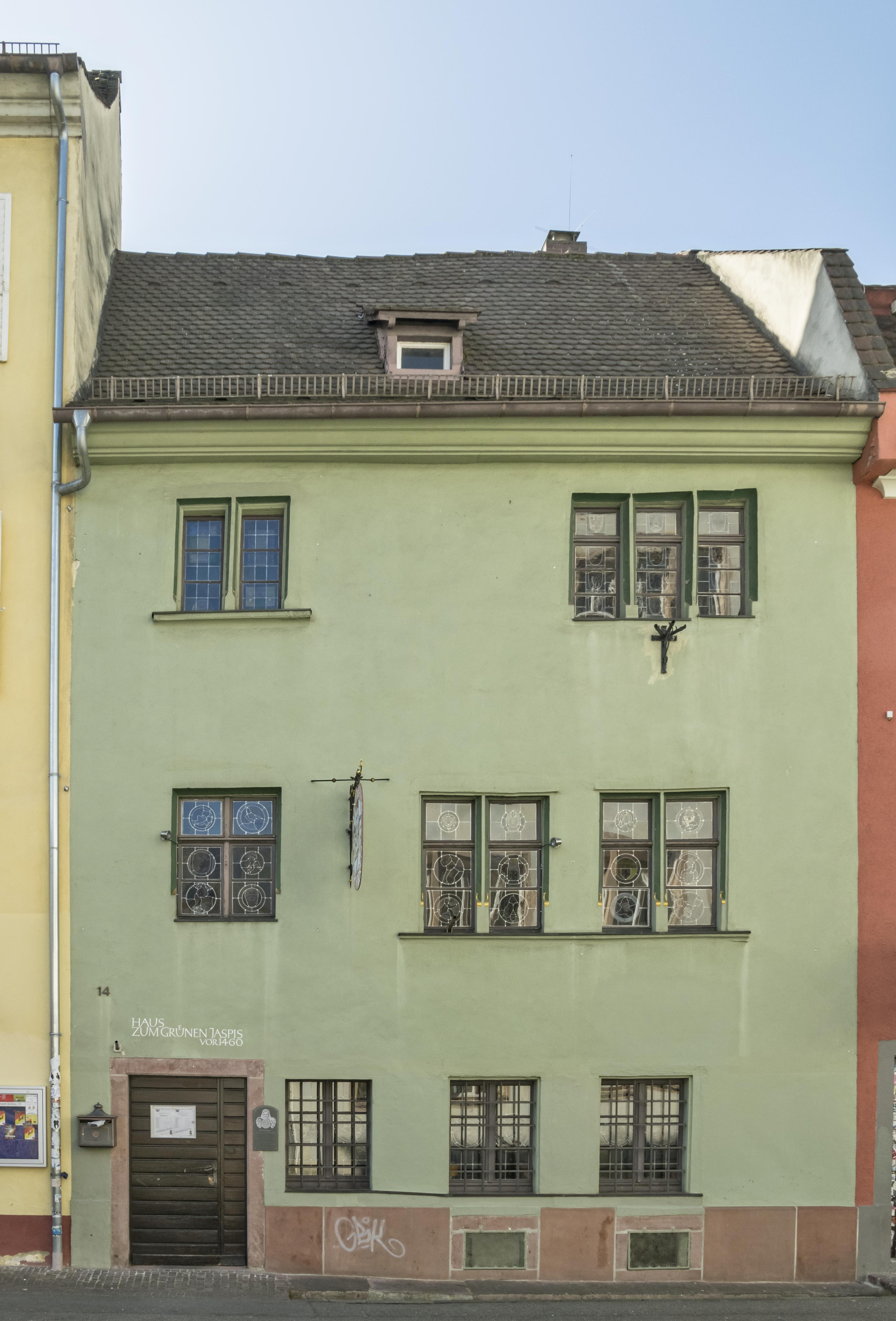 Bilder aus Freiburg Freiburg Zunfthaus der Narren